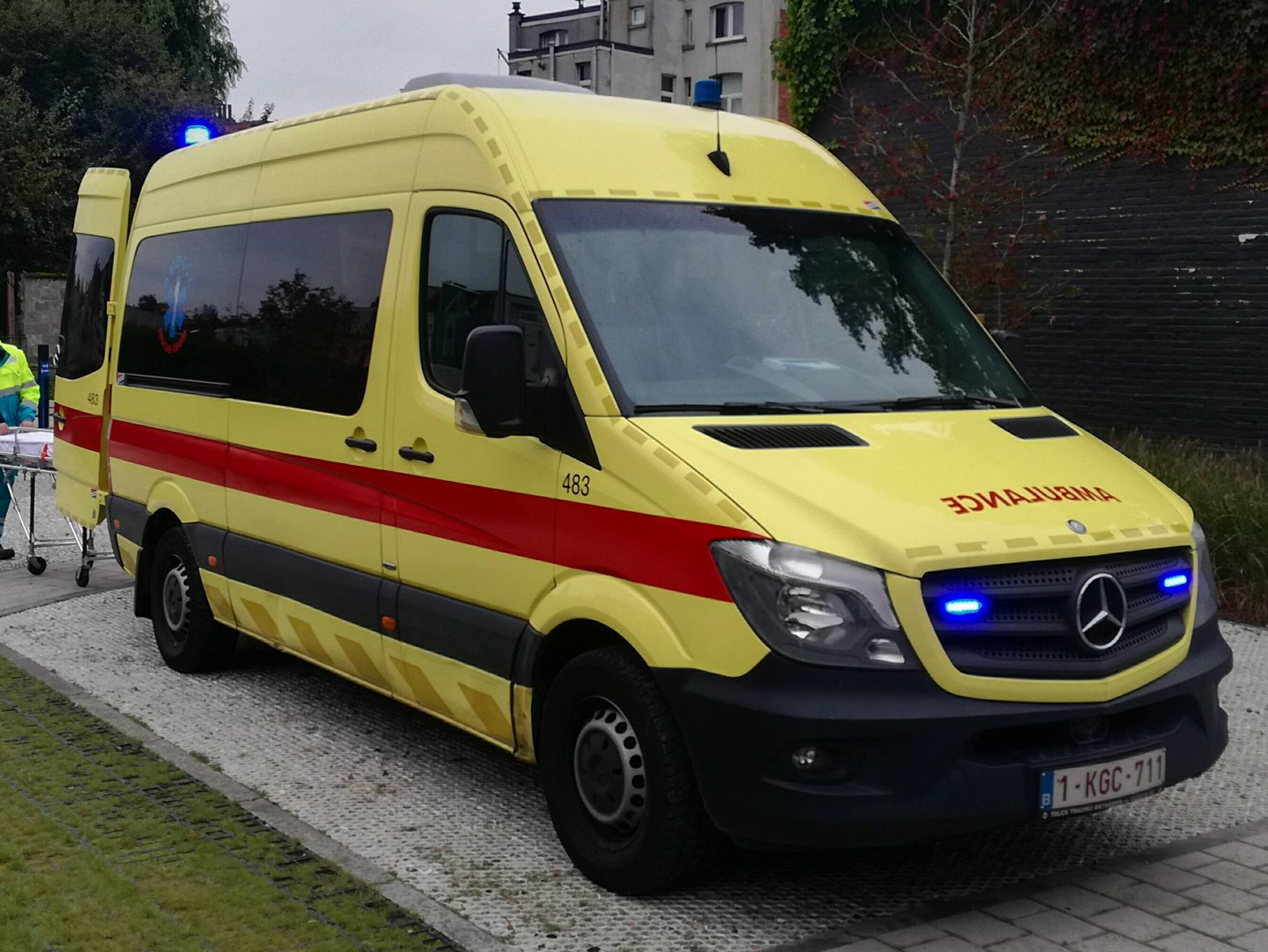 Een Belgische ambulance van dienst Falck Ambuce die bestemd is voor secundair ambulancevervoer